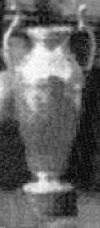 La Coupe de France de rugby